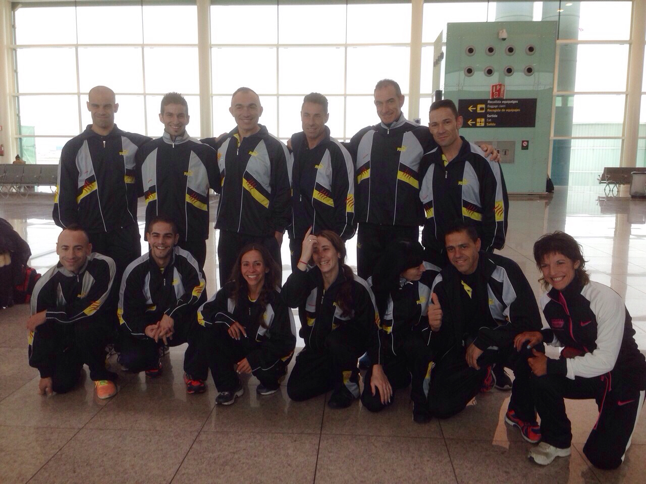 La selecció catalana rumb a Vicenza, Itàlia, per a participar en el Campionat del Món UIBBN 2014